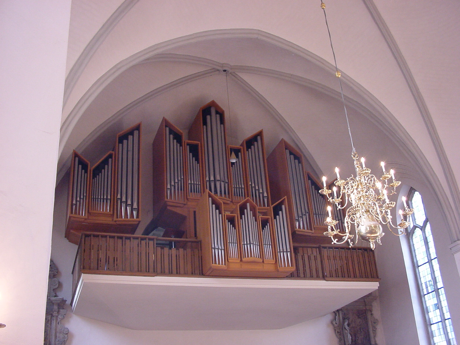 Prospektansicht der Orgel der ev-luth. Schloss- und Stadtkirche St. Crucis in Hannover, gebaut von Emil Hammer Orgelbau